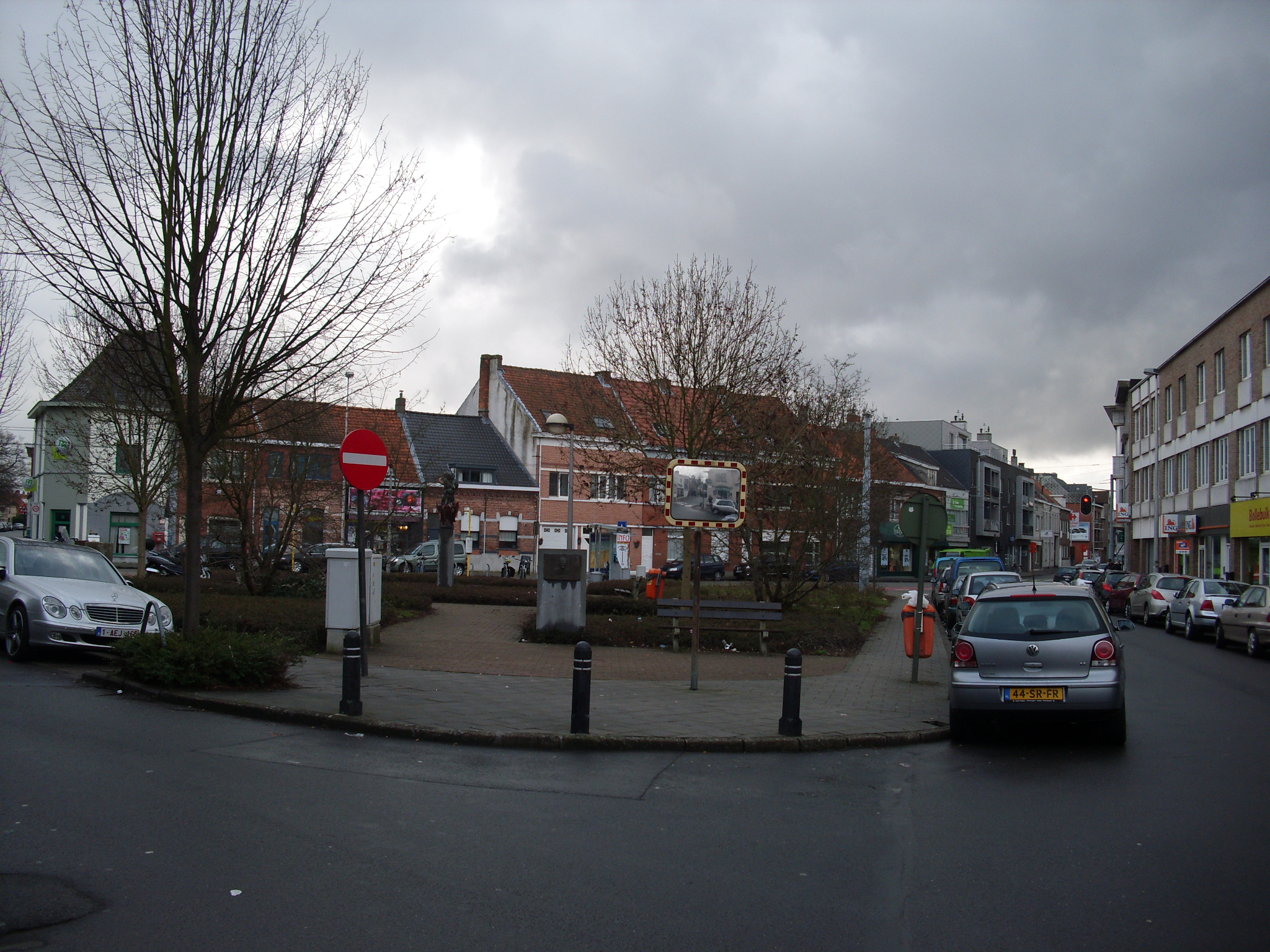 Maurice Claeysplein - Mariakerke - Gent - België